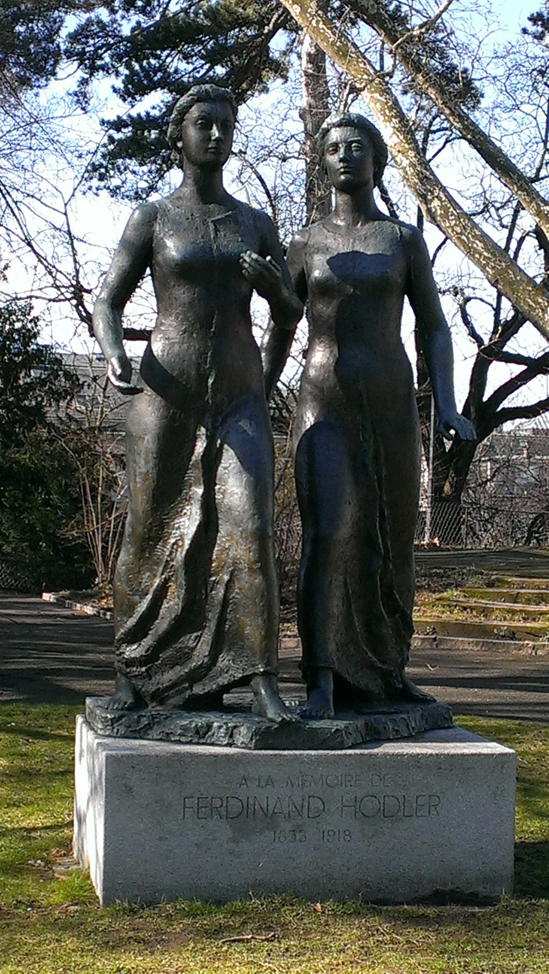 Monument à la mémoire de Ferdinand hodler - Henri König - Promenade du Pin, Genève